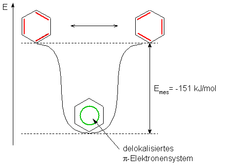 Mesomerie des Benzols